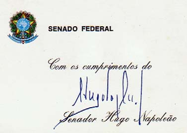 Assinatura do Senador brasileiro Hugo Napoleão do Rego Neto.